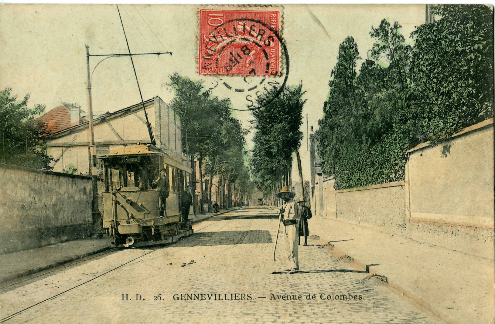 Carte postale ancienne éditée par HD N°26GENNEVILLIERS : Avenue de ColombesVue en gros plan d'un tramway pour Colombes. Noter l'évitement sur la voie unique du tramway